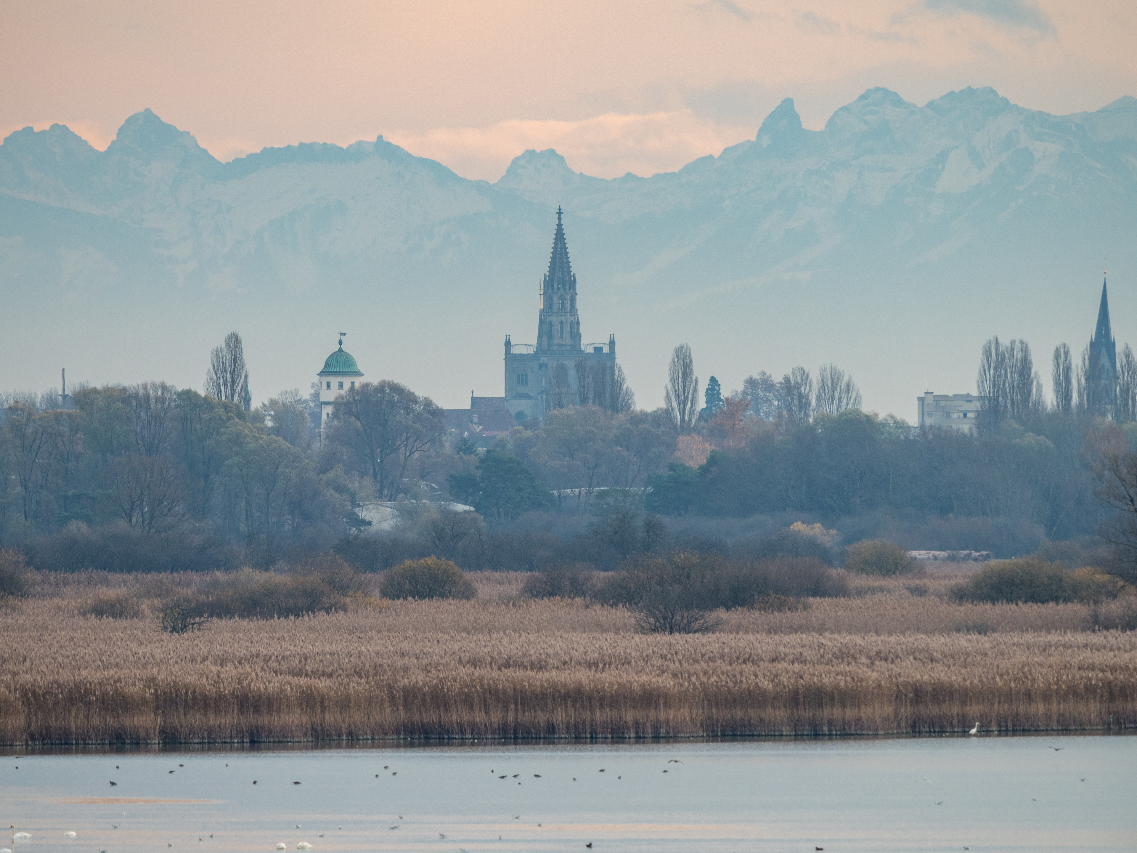 (Tele-)Blick von der Ruine Schopflen (Insel Reichenau) auf das Wollmatinger Ried, das Konstanzer Münster und die Alpen